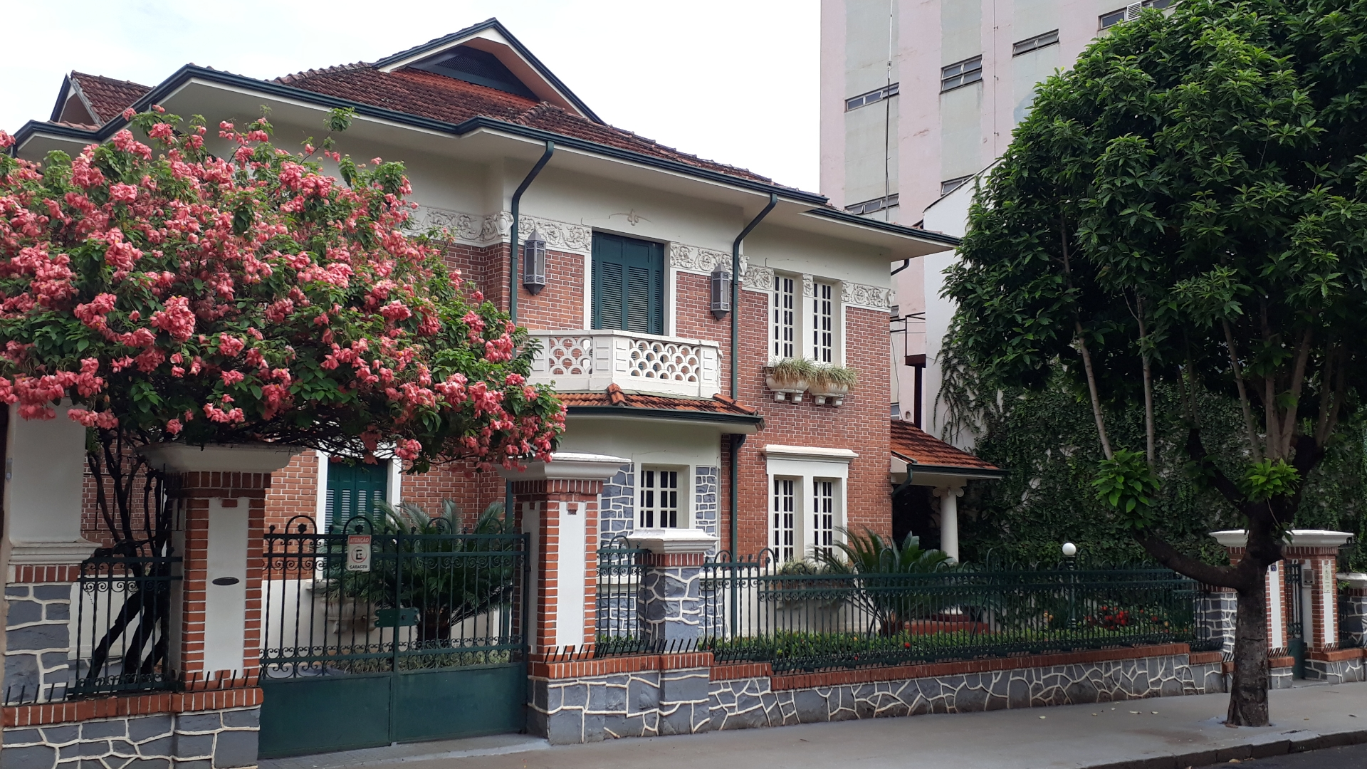 Casa da Memória Italiana, situada na cidade de Ribeirão Preto, interior do Estado de São Paulo, Brasil.